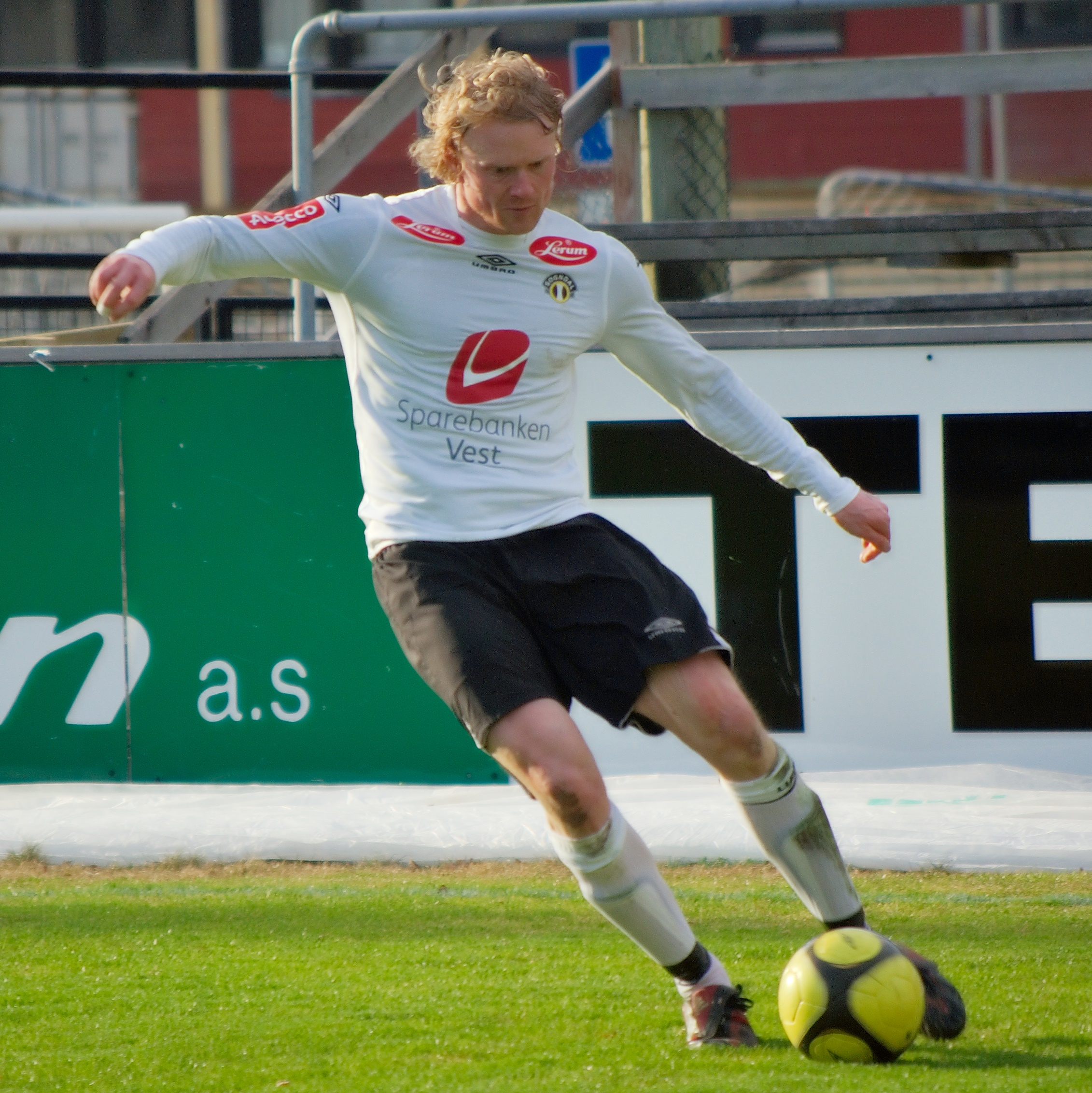 Jon Midttun Lie